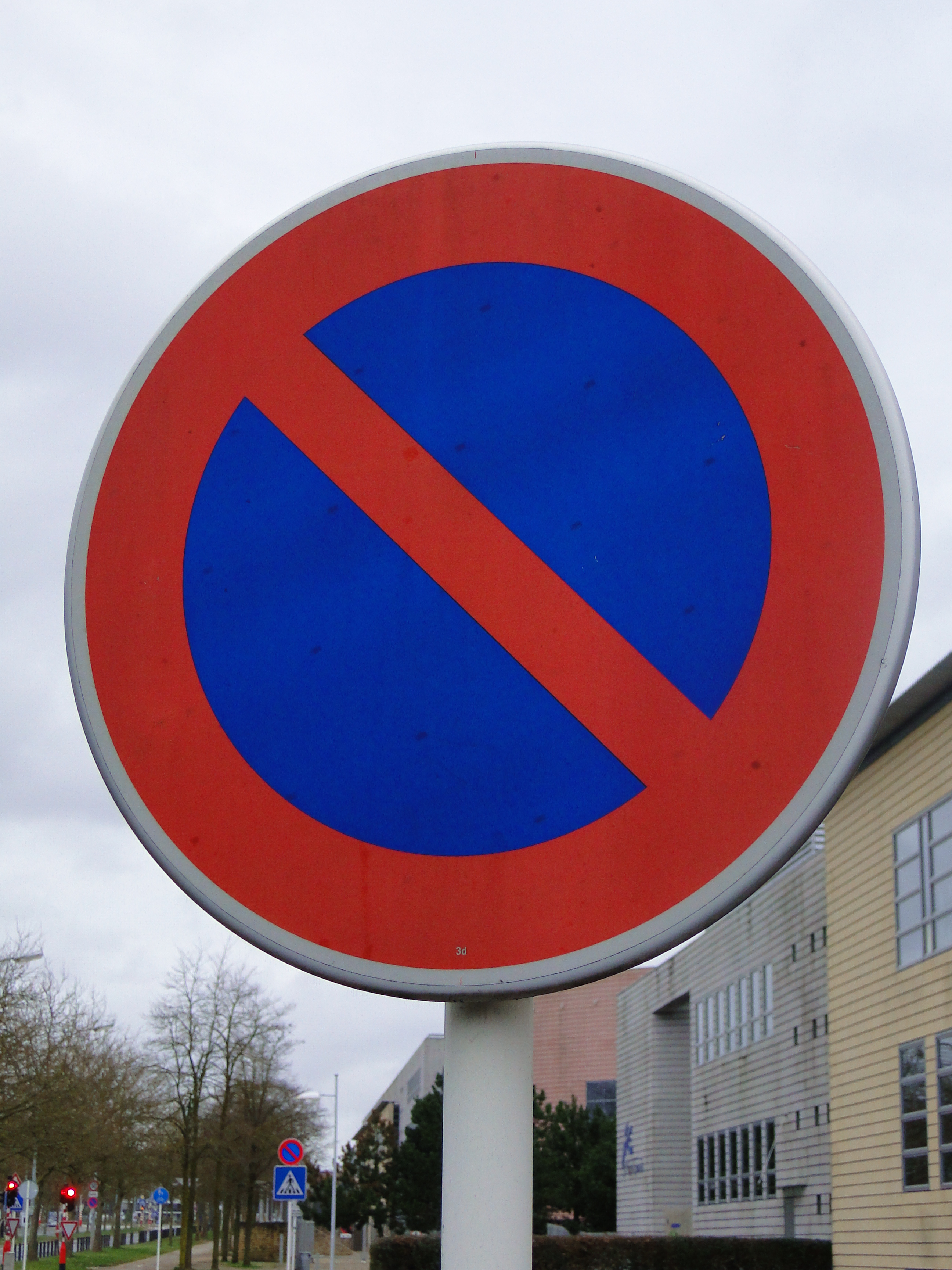 Verkéiersschëld C,18 "Stationnement interdit" aus dem lëtzebuerger Code de la Route.